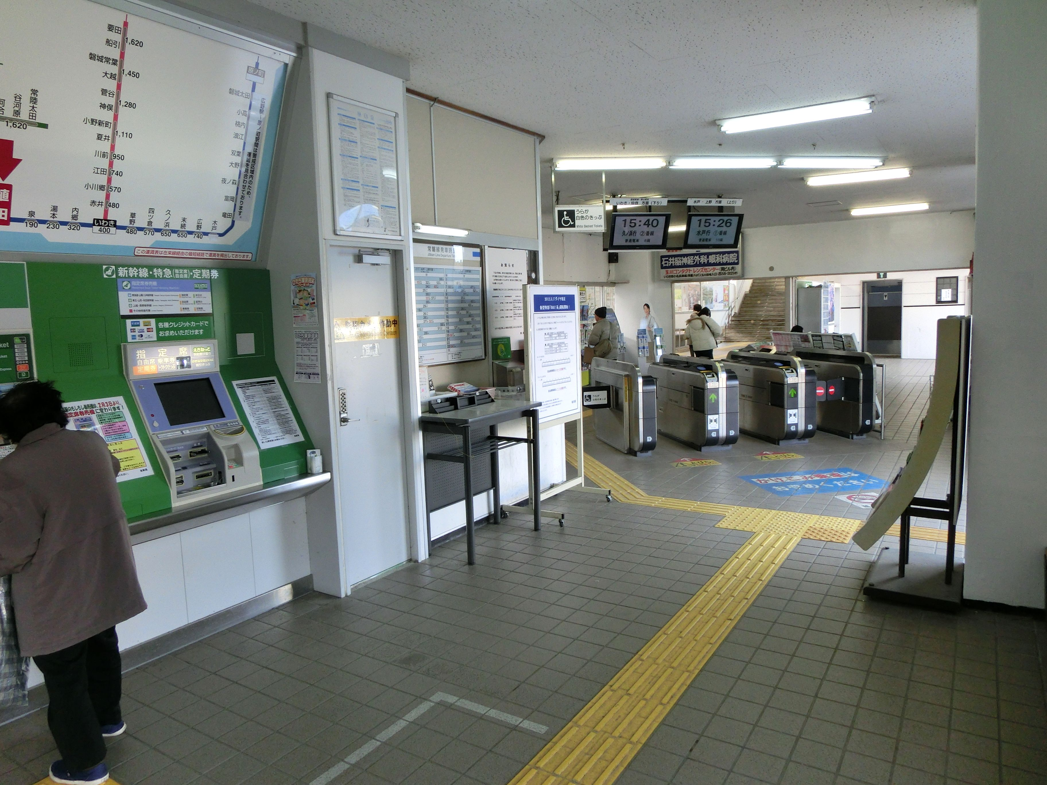 常磐線 植田駅舎内（改札付近）